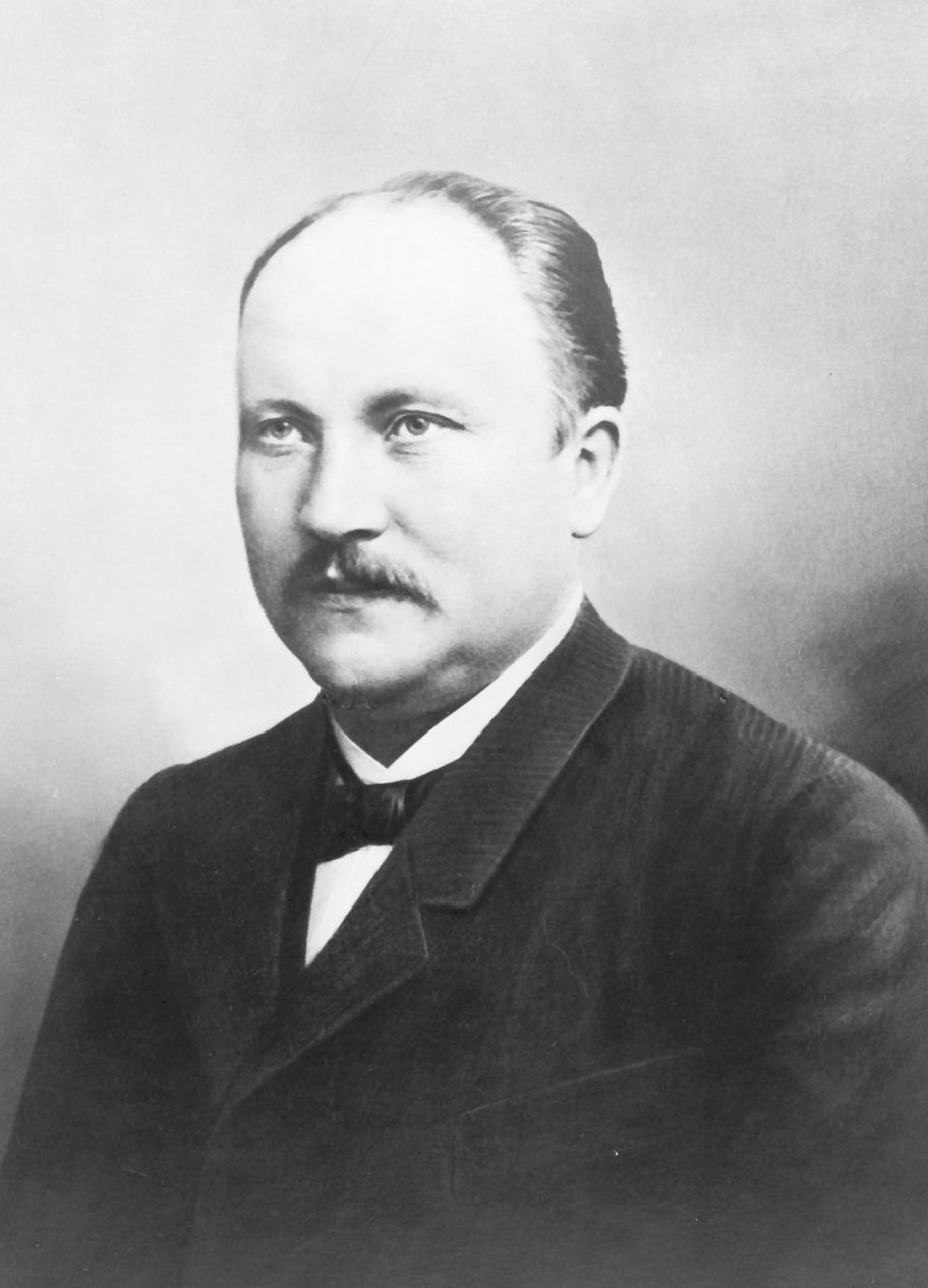 Foto von Hermann Wiederhold (* 11. Mai 1852 in Elberfeld; † 10. Oktober 1905 in Hilden), Lackfabrikant in Hilden